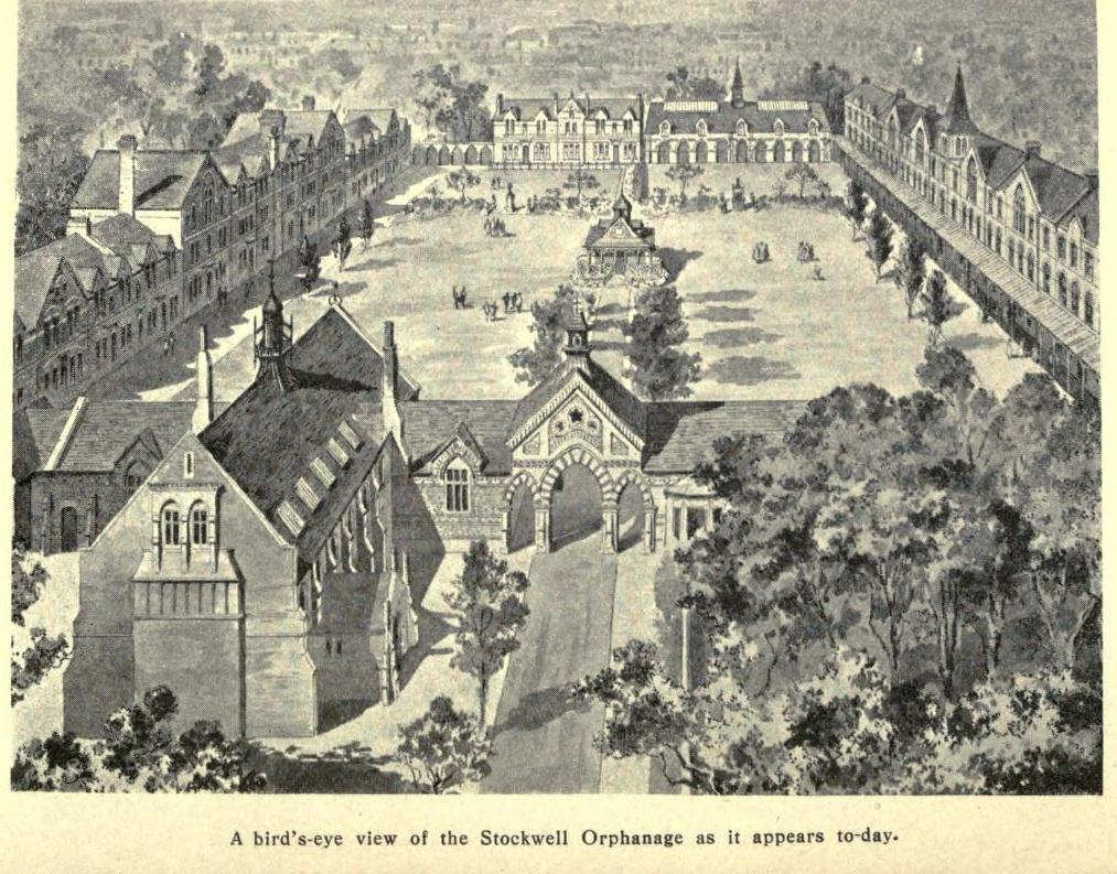 "Stockwell orphanage", orfanato para crinaças de Charles Spurgeon